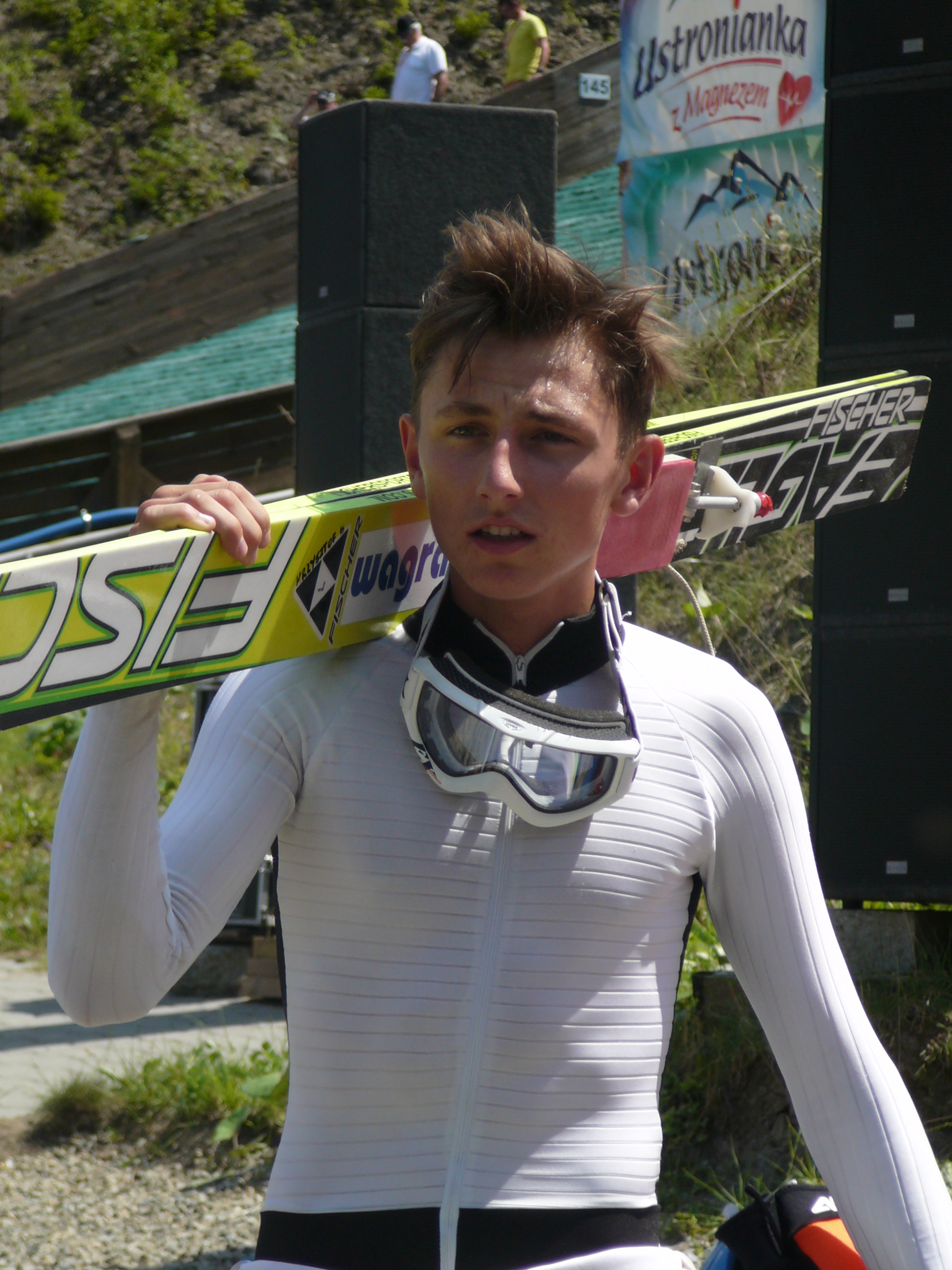 Krzysztof Biegun podczas drużynowego konkursu letnich mistrzostw Polski w Wiśle (2014)